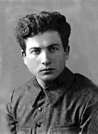 Михаил Львович Гебелев